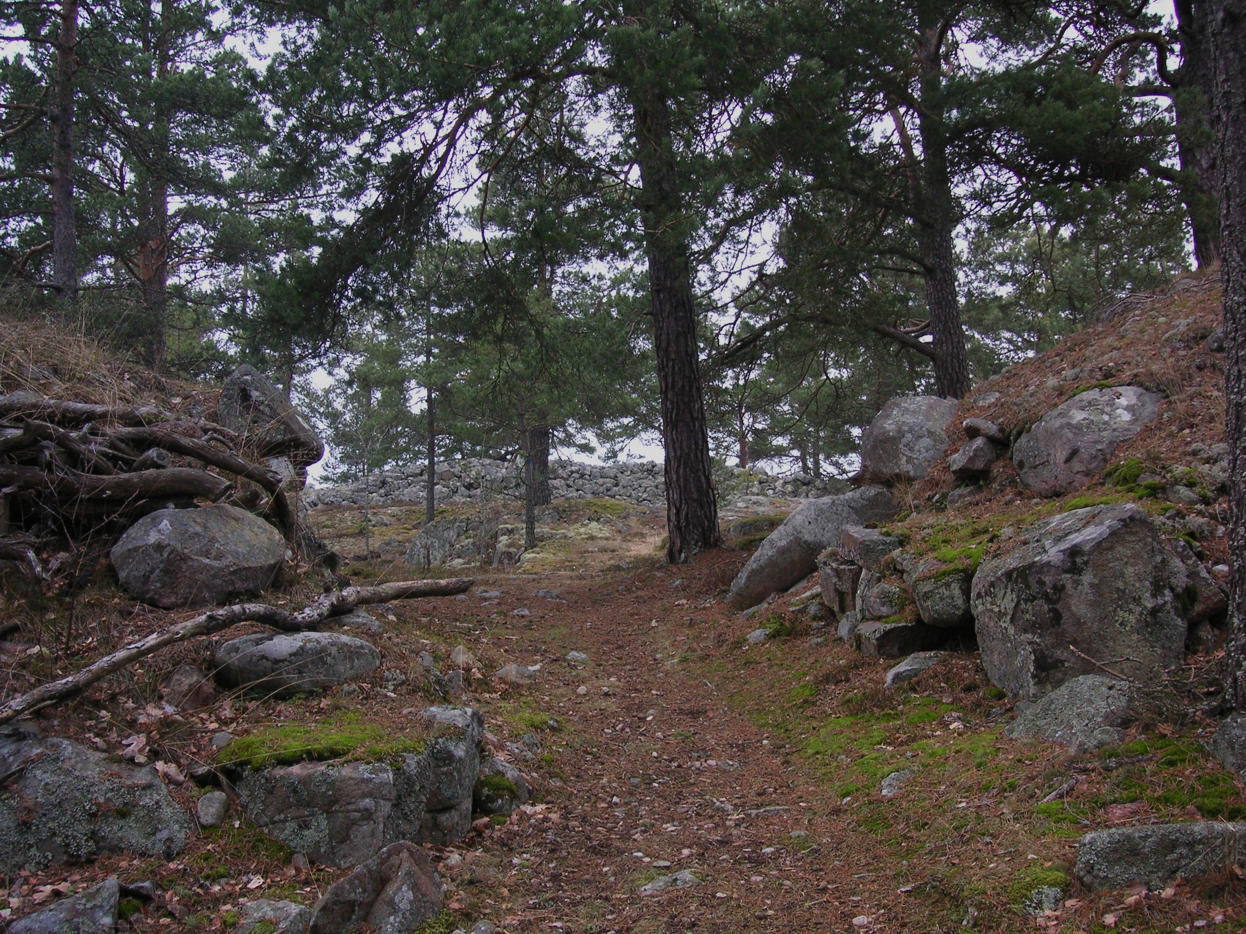 Fornborgen "Skansberget" på Adelsö, södra porten